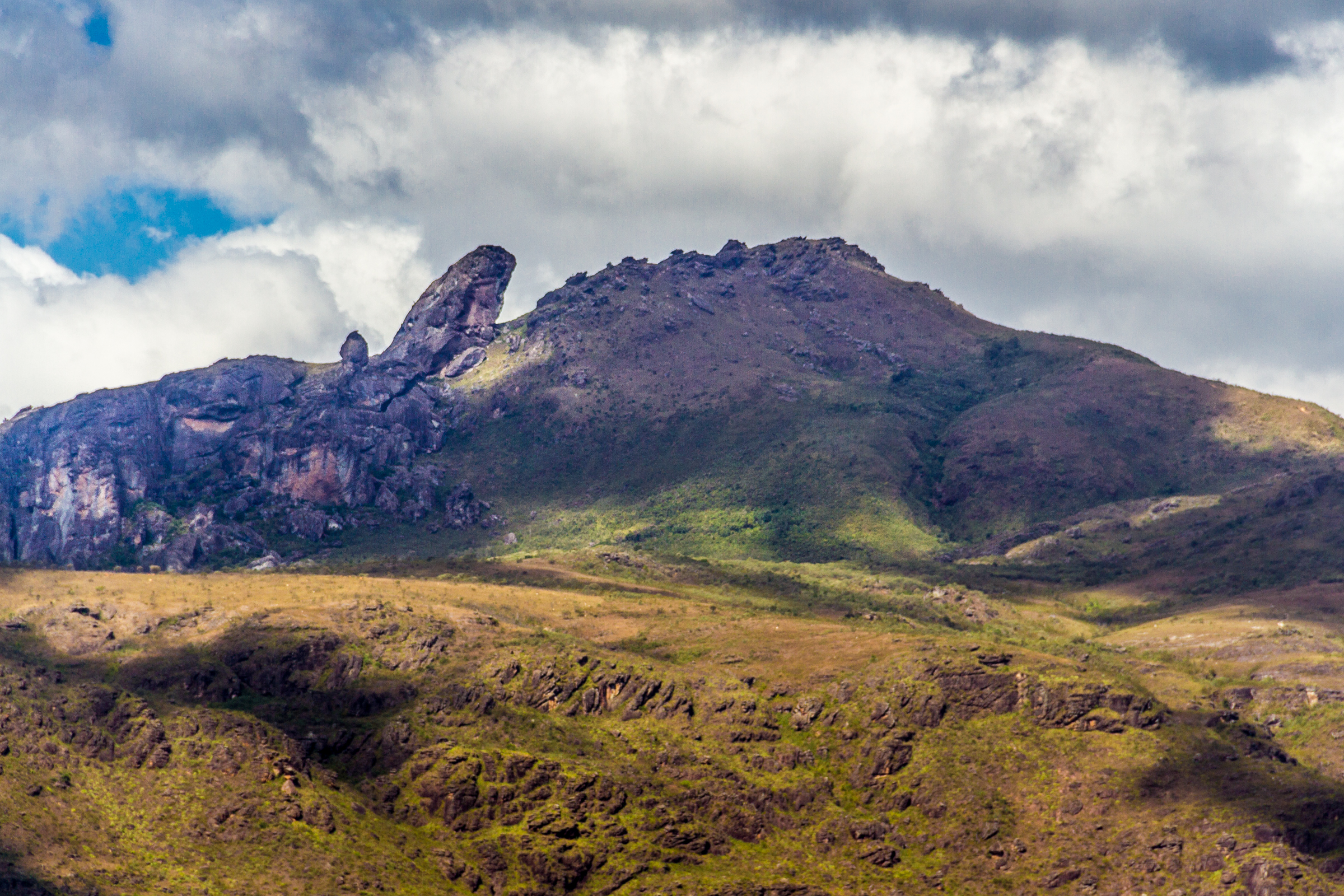 Nuvens passam pelo parque sobre o pico.